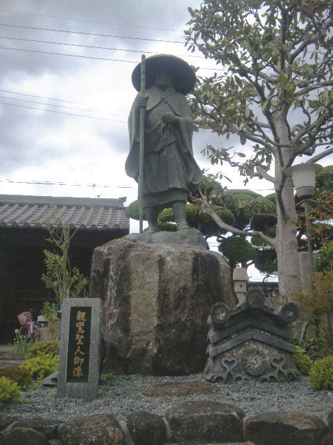 信光寺の親鸞像